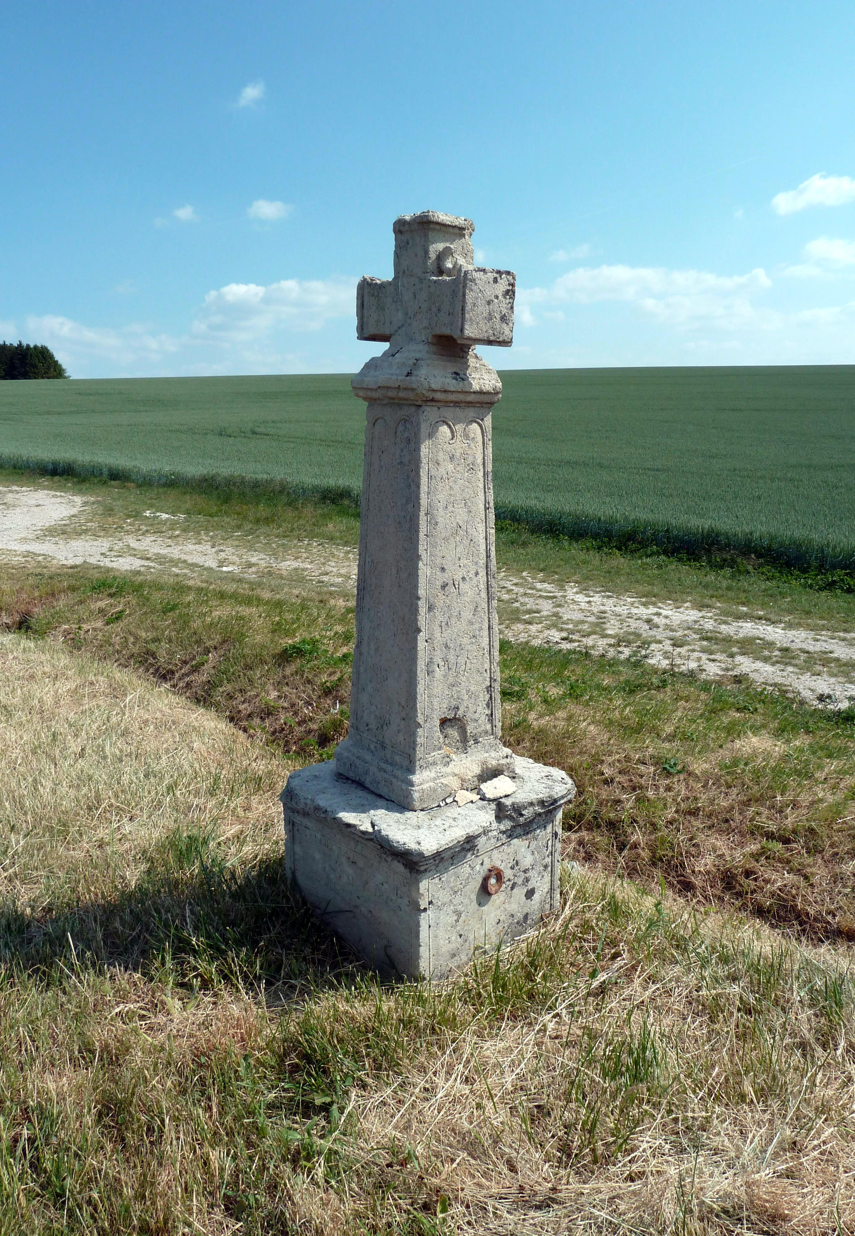 Somme-Yèvre (51), Croix Rossin (ou Raussin), au bord de la RD 994 (ancienne Voie romaine Reims-Metz), altitude 200 m (repère de nivellement J.A.M3P3 - 1 altitude illisible sur le côté droit, référence différente sur Géoportail J.A.M3P3 - 8 198m,802). Une inscription en partie effacée sur la face avant commence par ces mots : "En ce lieu est mort par un triste accident le 14 juillet 1841 (?) Nicolas Raussin (?) ... âgé de 61 (?) ans époux de Marie (?) ..." le reste est illisible.